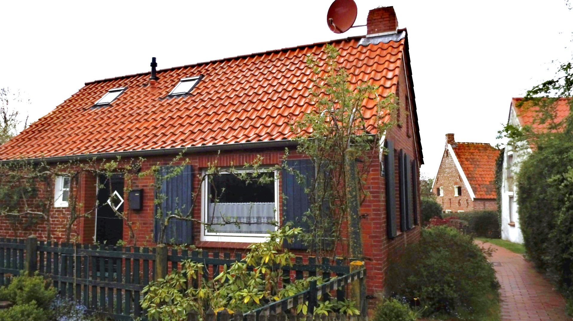 Kleine Straße „Krummer Gang“ in dem Krummhörner Dorf Manslagt